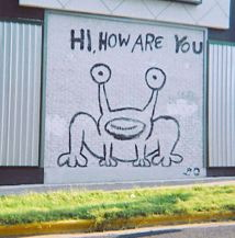 Hihowareyoufrog